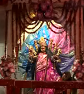 দেবী মহিষমর্দিনী